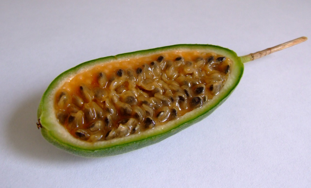 Quelle: selbst fotografiert, 08/2006 Fotograf: Späth Chr.